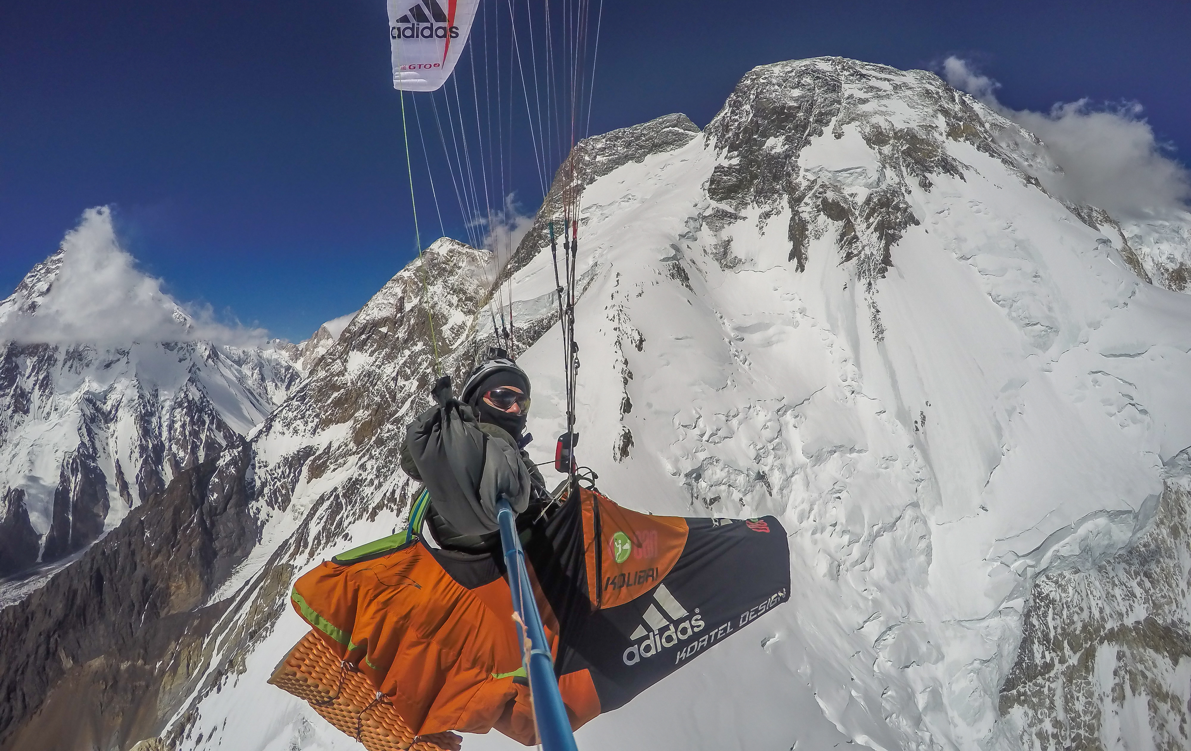 Ascension du Broad Peak par Antoine Girard